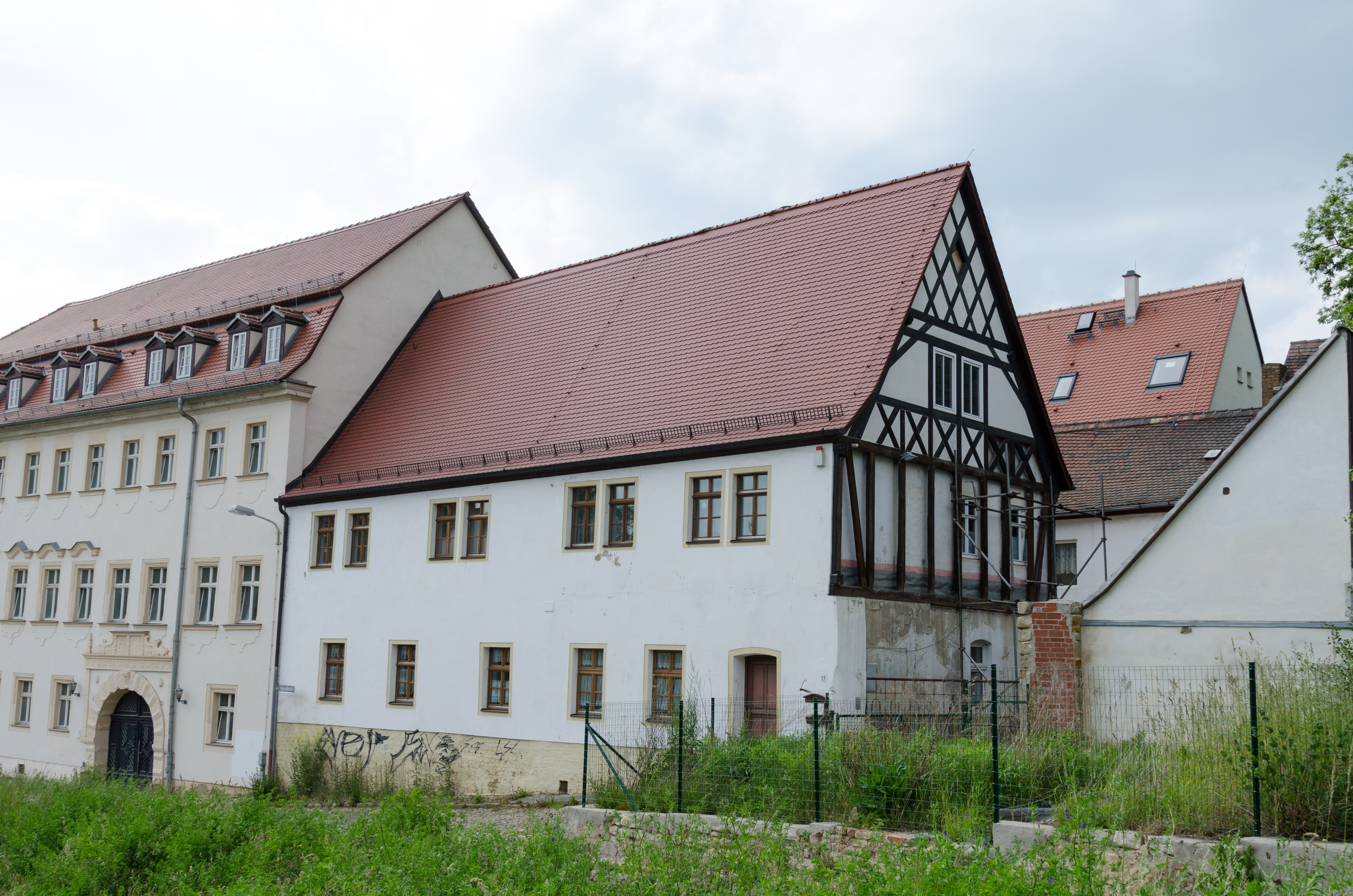 Zeitz, Scharrenstraße 17